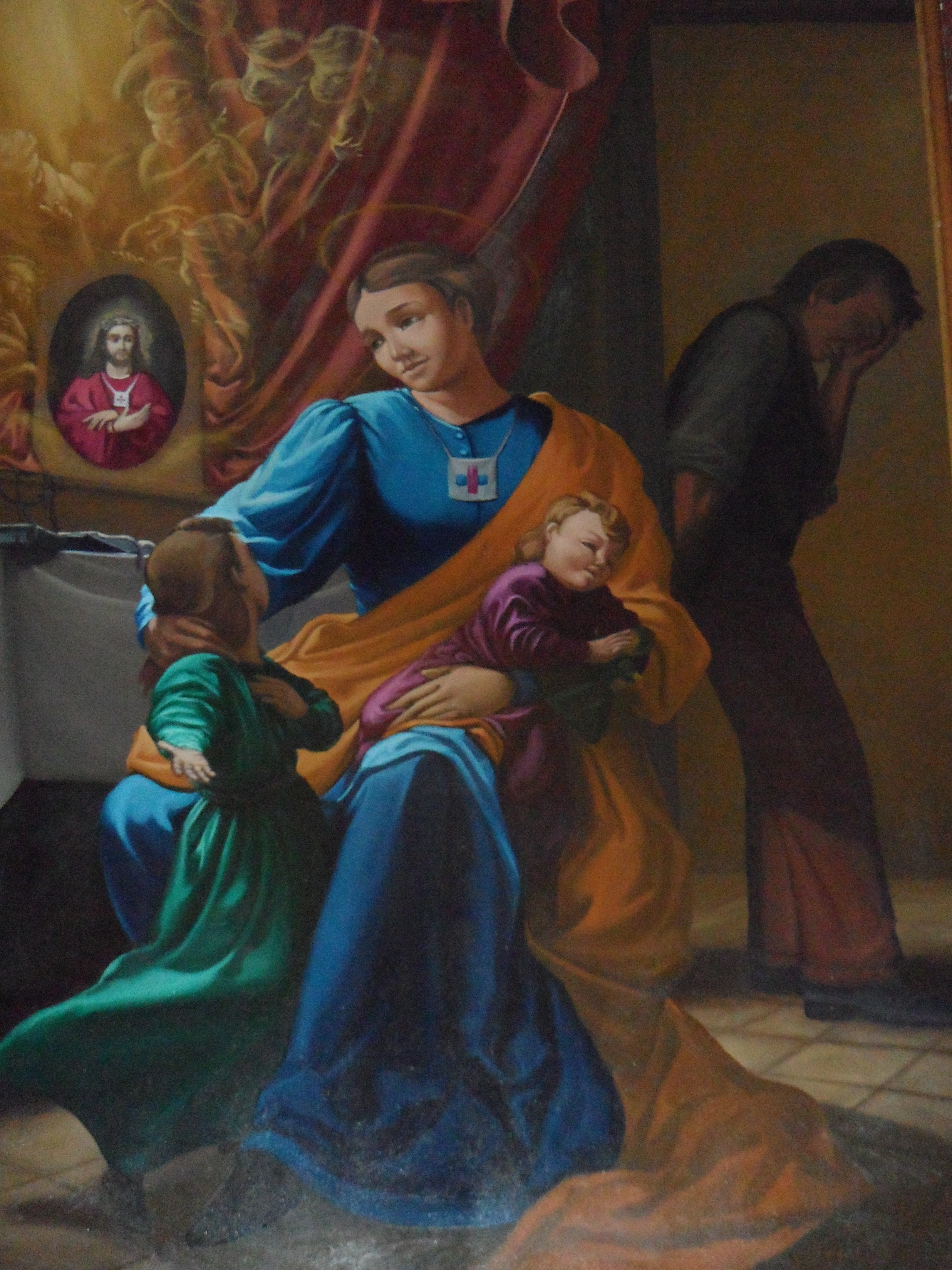 Iglesia de los trinitarios españoles. Nápoles-Italia.